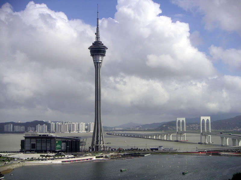 Macau Tower, Macau